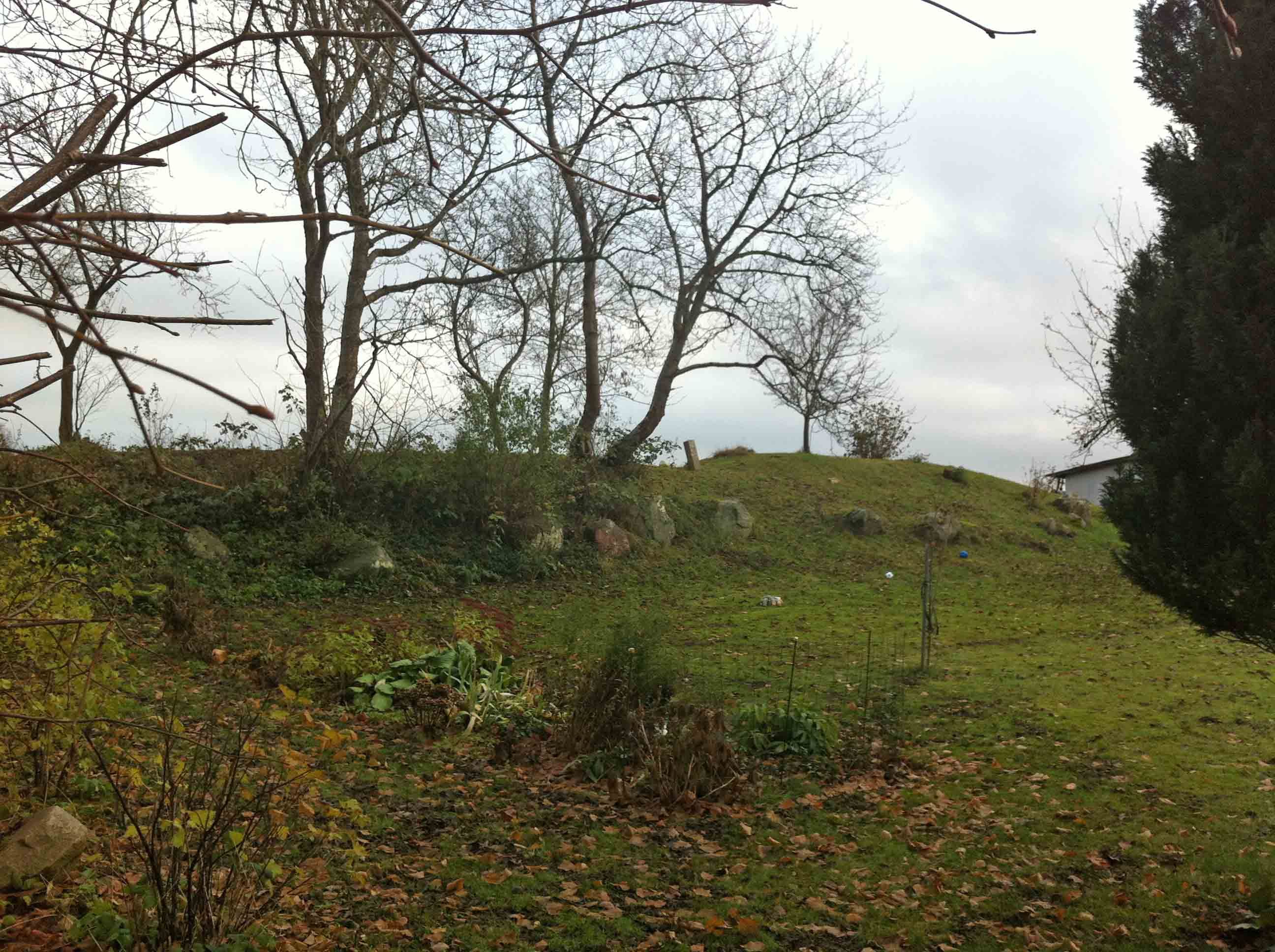 Langdysse i Døjringe